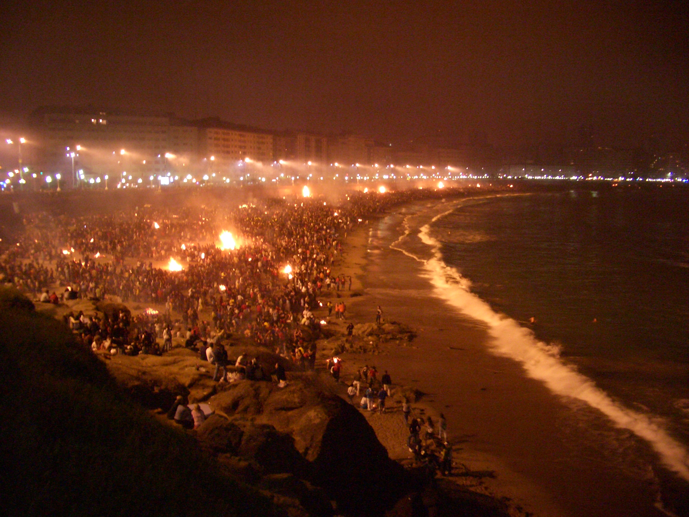 Noite de San Xoán do ano 2006 na praia do Orzán, A Coruña.